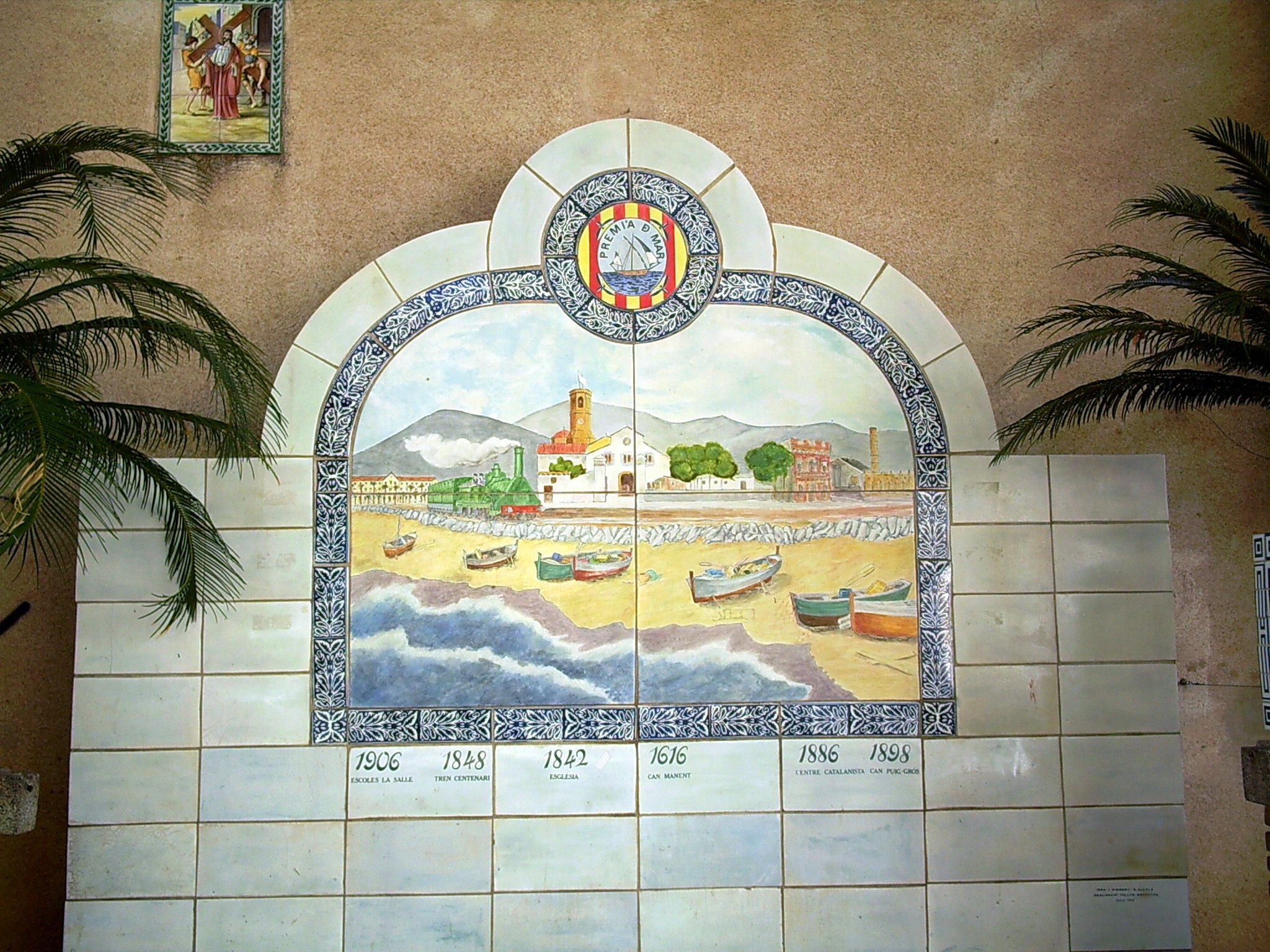 Ceràmica de l'història de Premià de Mar, comarca del Maresme, (Catalunya): 1906 Escoles de la salle 1848 Tren centenari 1842 Esglèsia 1616 Can Manent 1886 Centre Catalanista 1898 Can Puig-grós